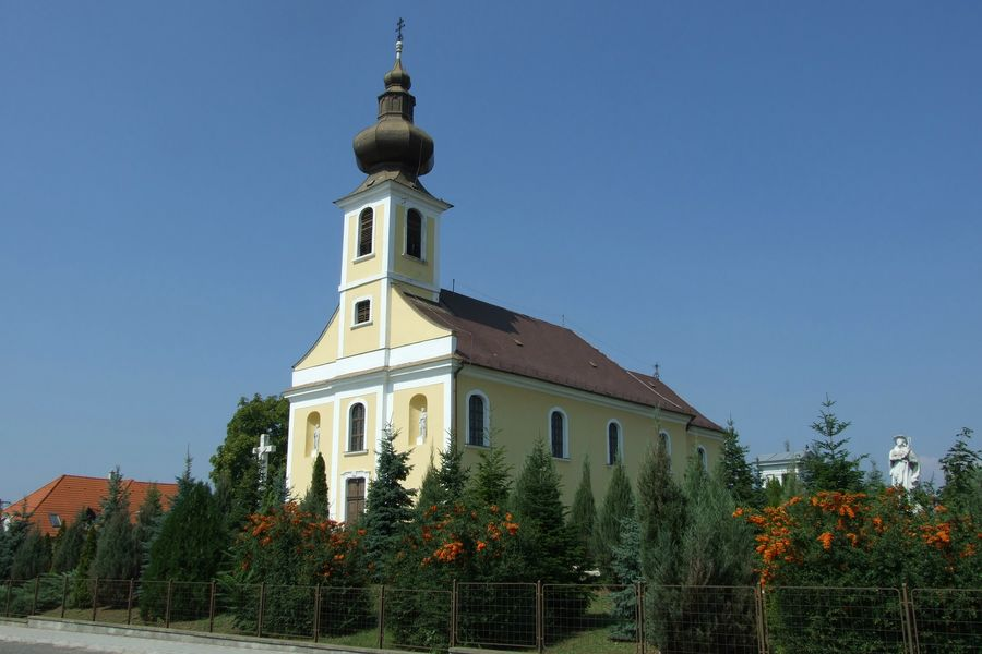 Római Katolikus Templom, Kál, Magyarország This is a photo of a monument in Hungary, Identifier: 5759